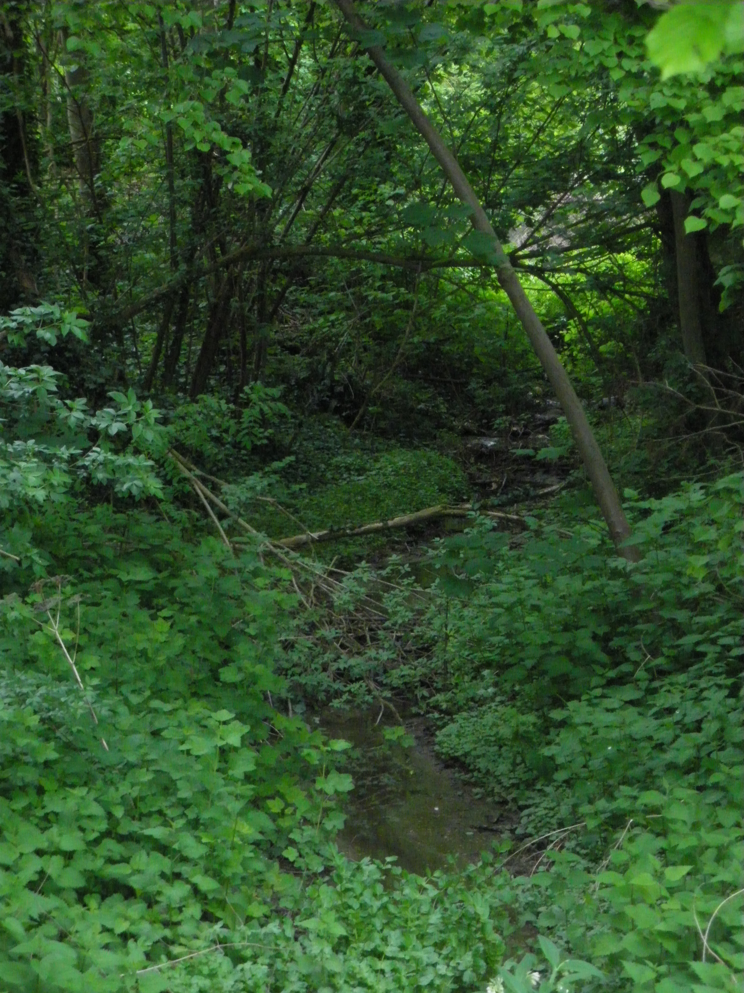 Rivière à Vaugrigneuse, Essonne, France